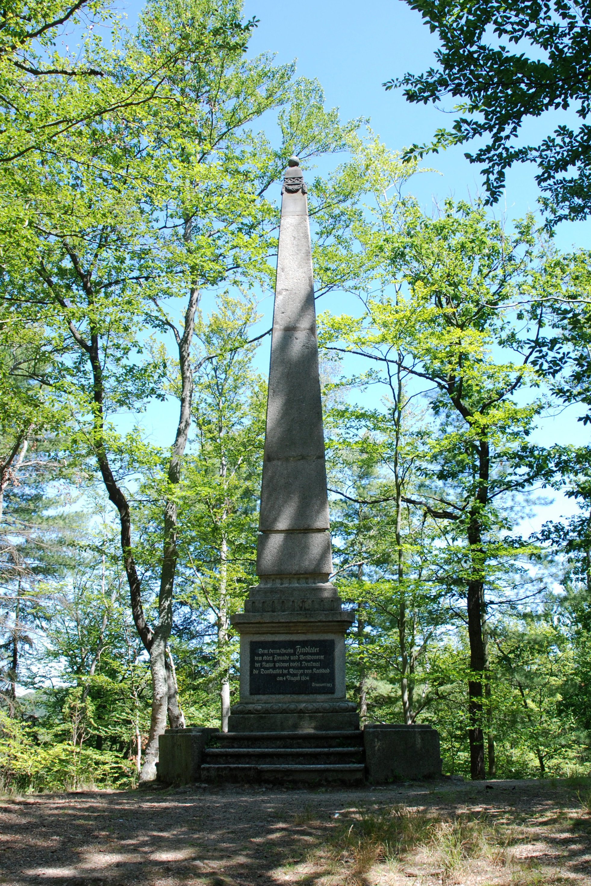 Findlaterův obelisk v karlovarských lázeňských lesích